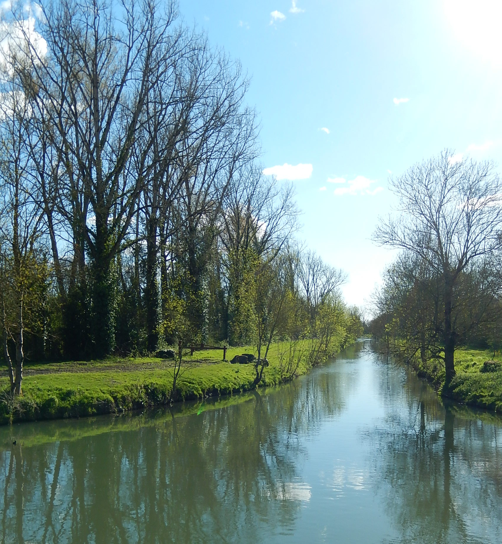 L'endroit à partir duquel la rivière Devise prend le nom de Canal de Charras, au niveau du pont de la route D112, entre les communes de Muron (à gauche) et Landrais (à droite) (Charente-Maritime, France).